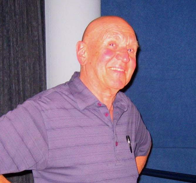 Janez Matičič, slovenian composer (living in Paris) photo:Ziga 21:08, 26 September 2006 (UTC)